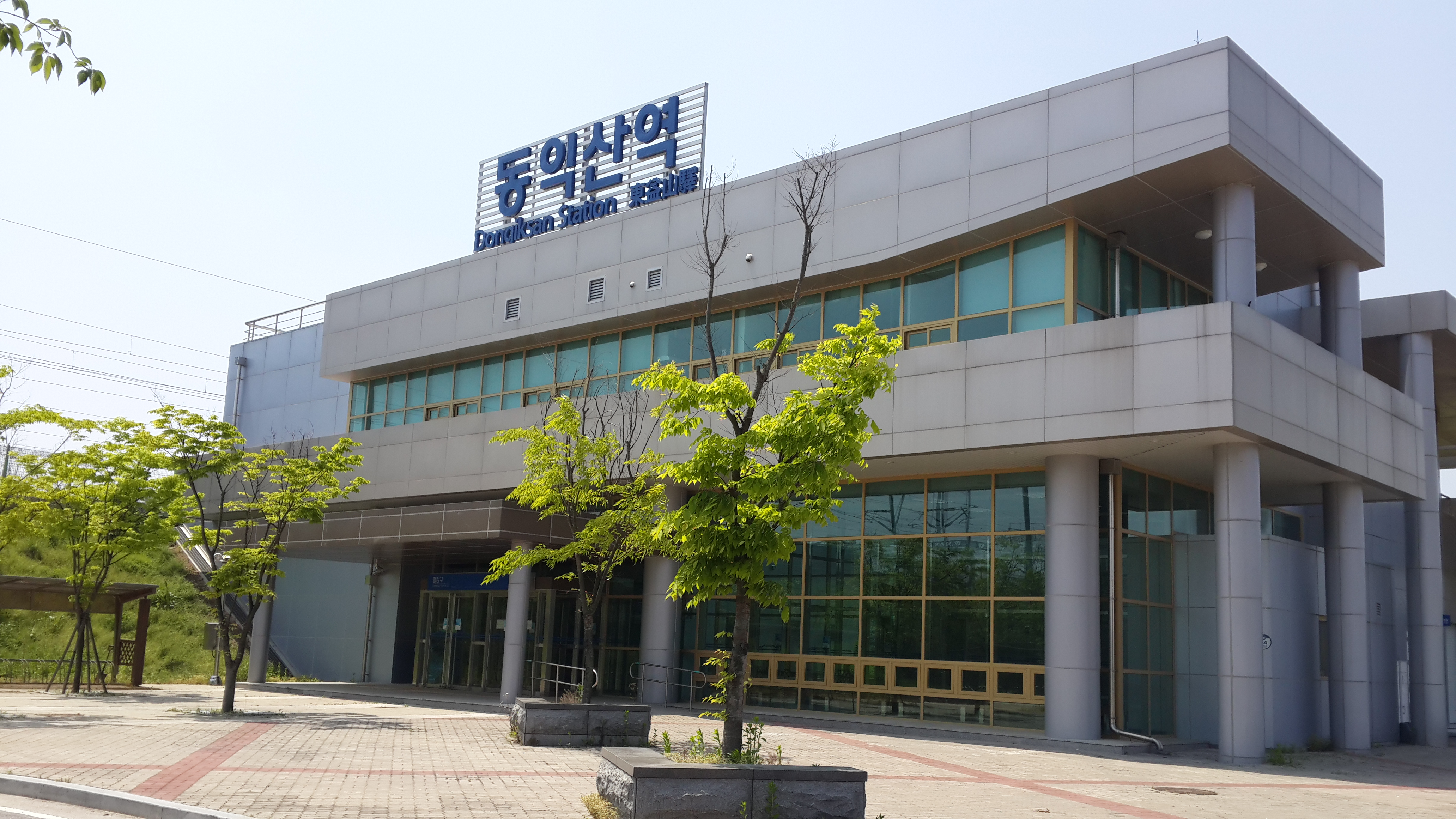 2015년 5월경에 촬영한 사진